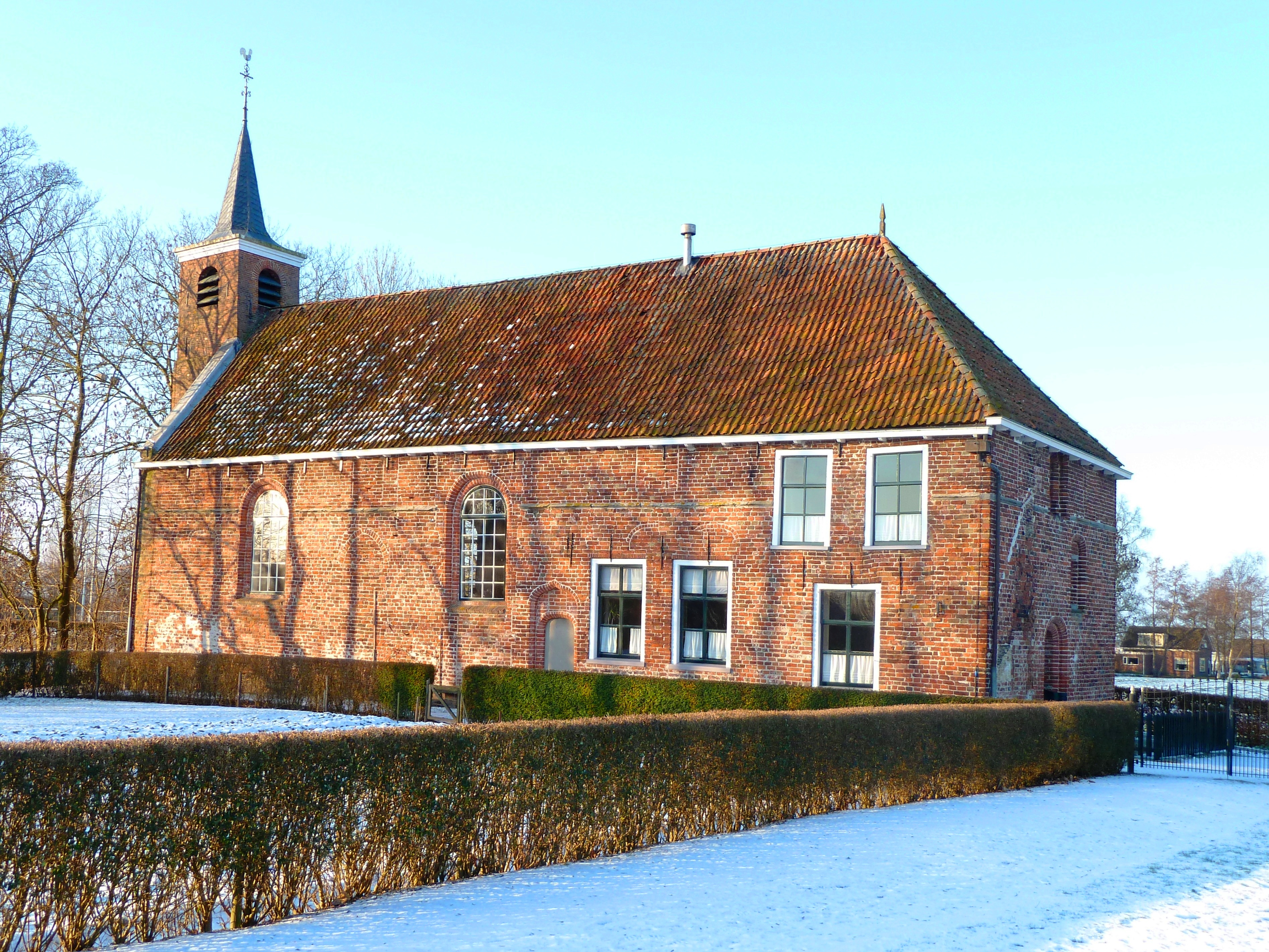 Hervormde kerk van Gerkesklooster (oude brouwerij van het klooster Jeruzalem).